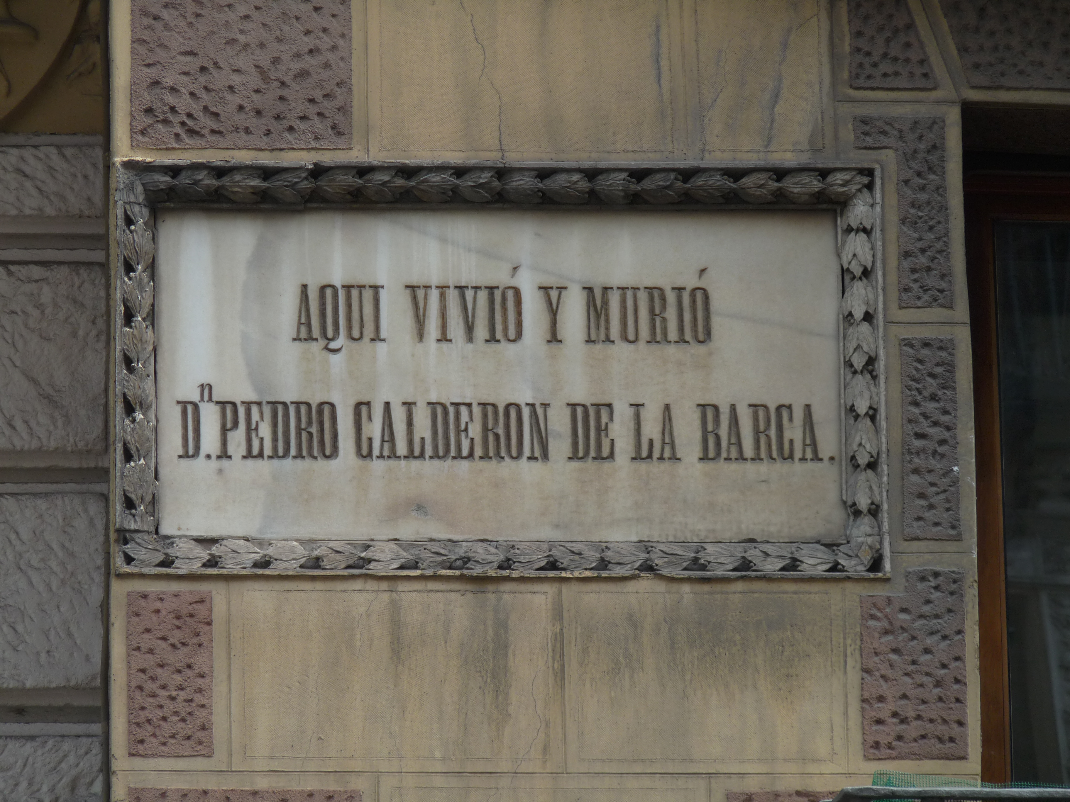 Detalle de la fachada de la Casa de Calderón de la Barca, Madrid, España